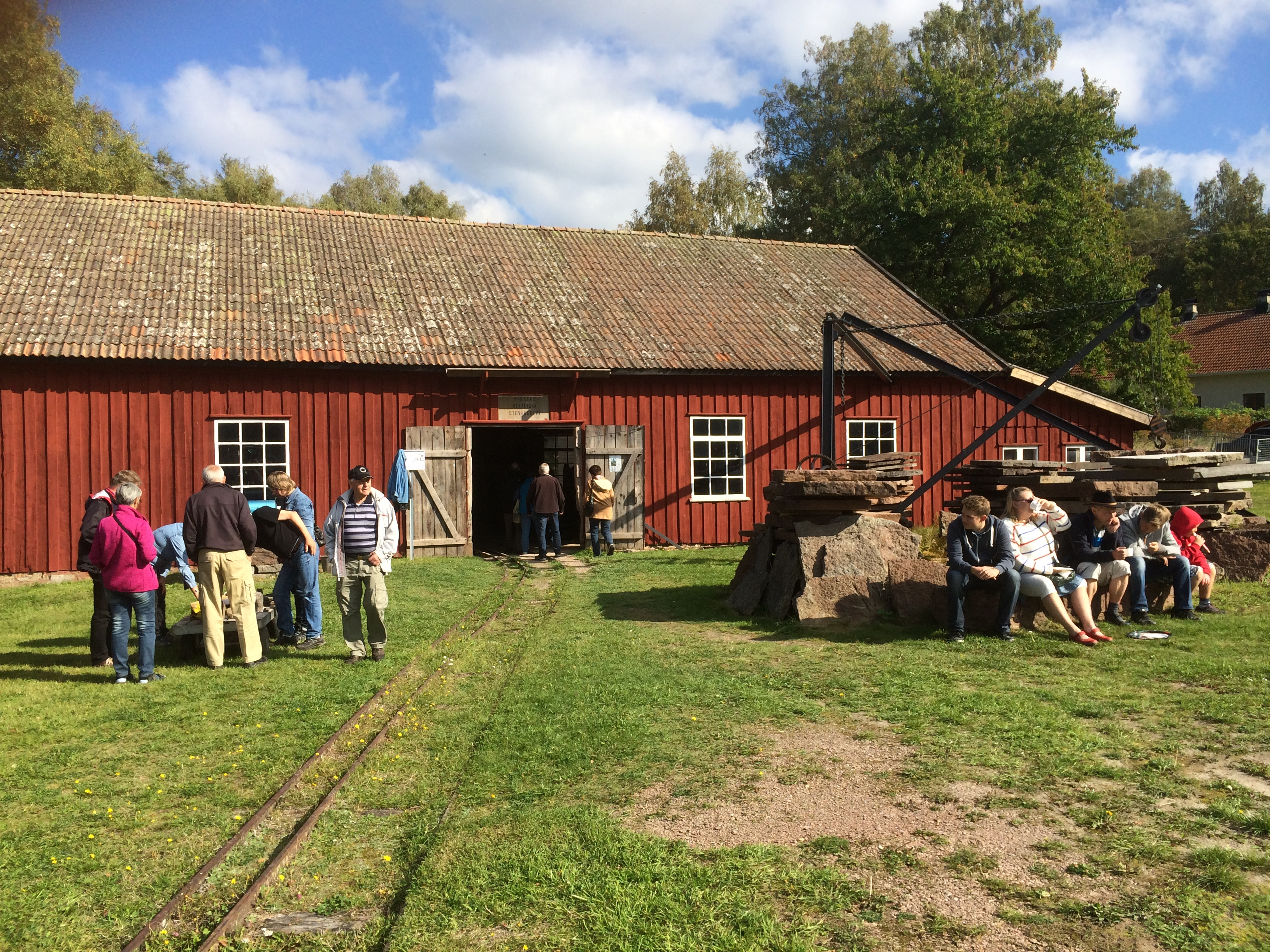 Besöksdag på Råbäcks mekaniska stenhuggeri 2014